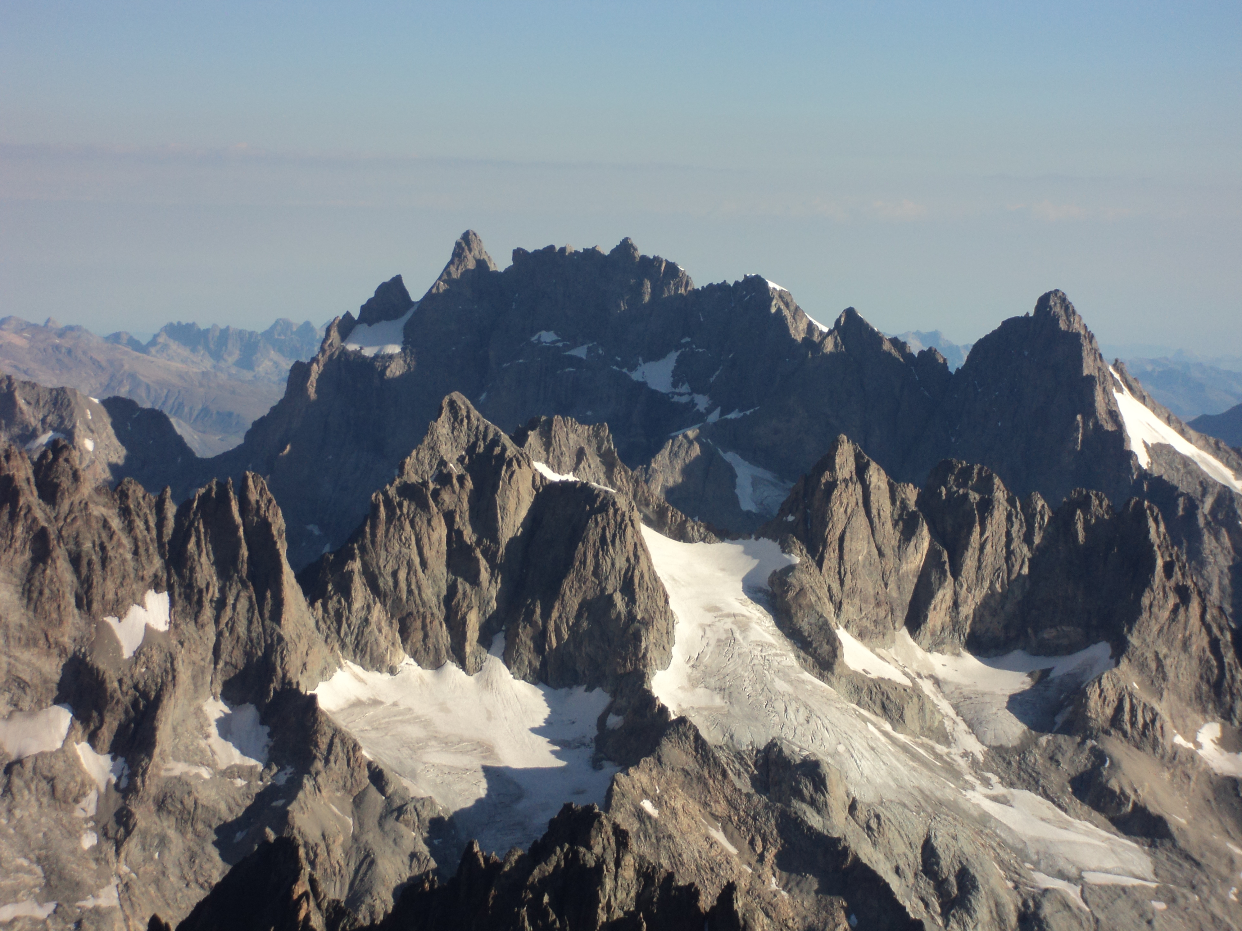 La Meije (a sinistra) ed il Pic Gaspard (a destra) nei loro versanti sud visti dal Dome de Neige des Écrins - Massiccio des Écrins - Alpi del Delfinato - Francia